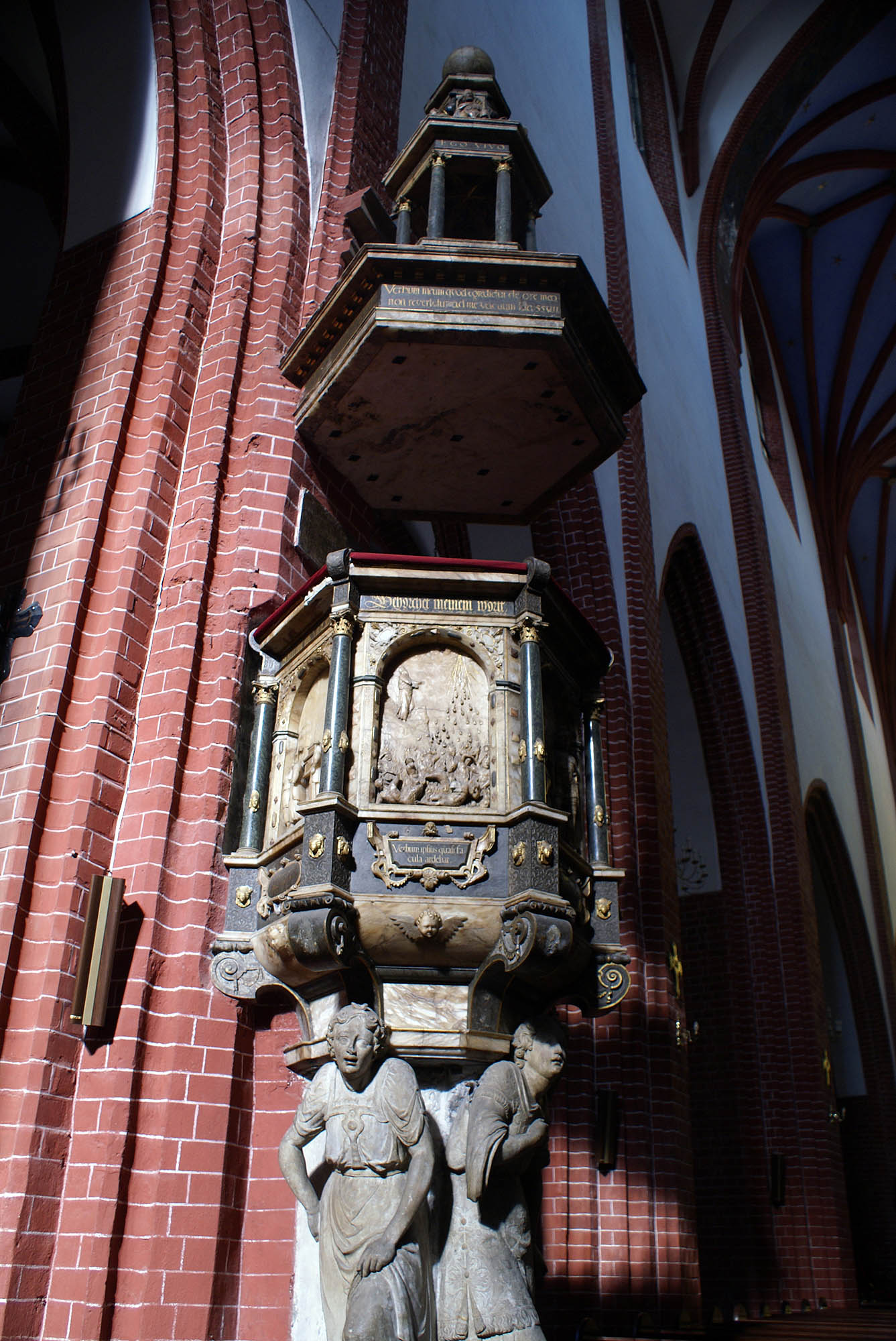 Wrocław, kościół p.w. św. Marii Magdaleny, ob. katedra polsko-kat., 1342-1360, 1 poł. XV, 1888-1992, po 1945